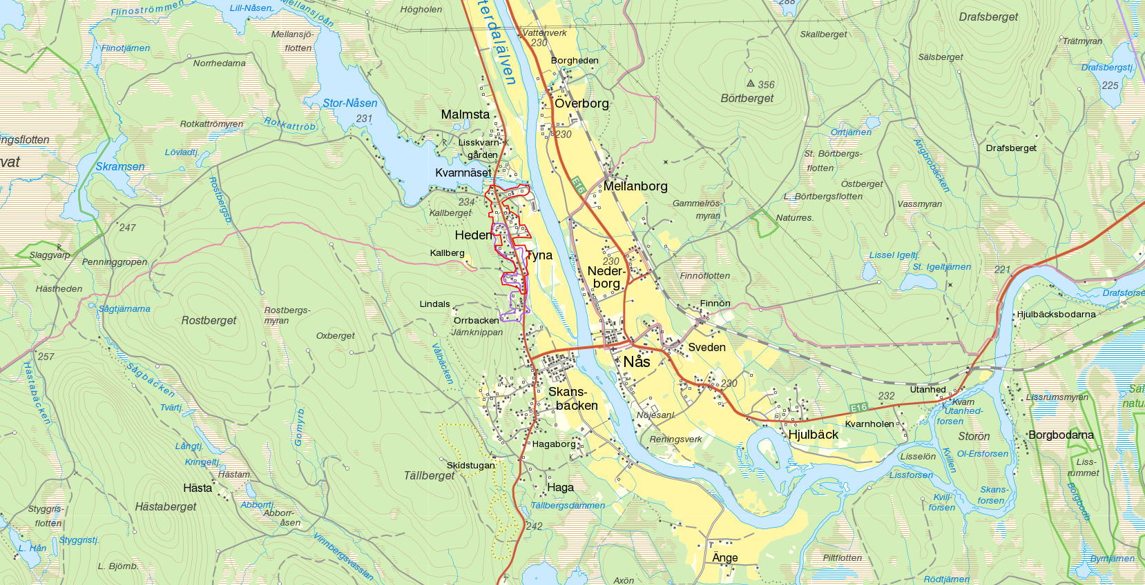 Småorten Tyna och Heden 2010 (i rött) och småorten Tyna 2000 (i lila). Bakgrundskarta från Lantmäteriet, skala 1:30 236.